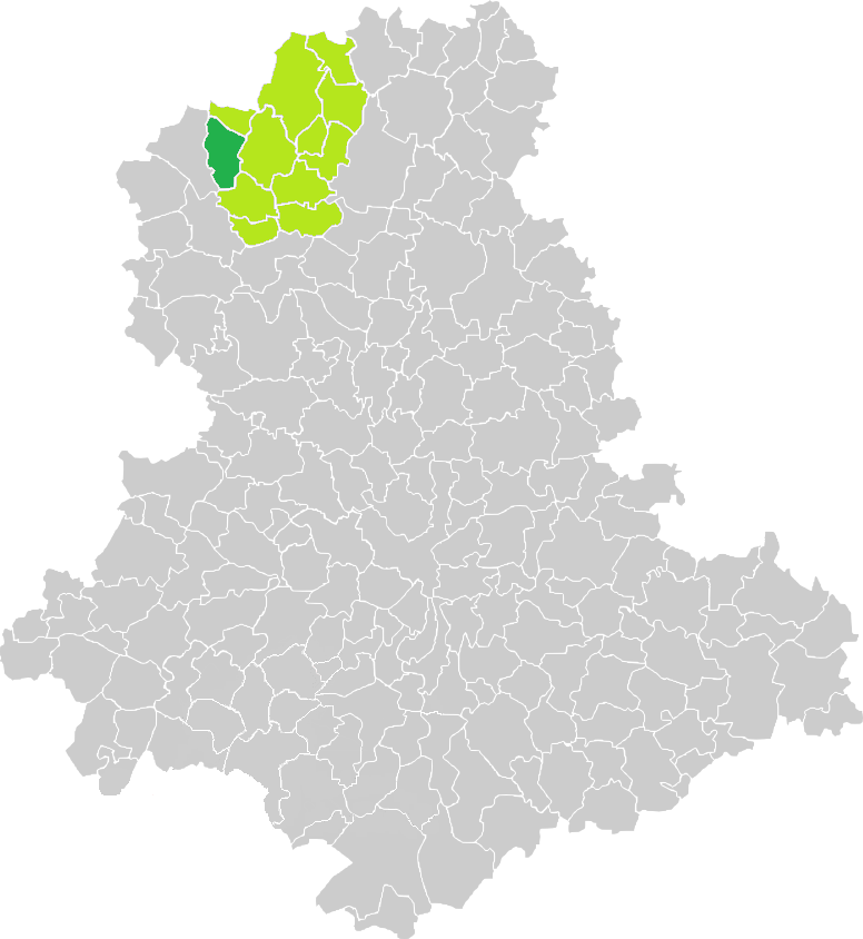 Carte de situation de la commune de Darnac (en vert foncé) dans le votre Canton (en vert clair) sur une carte des communes de la Haute-Vienne